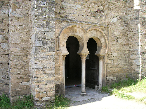 Entrada principal con doble arco de herradura encuadrada en un alfi. Vuela hasta esta localización . Necesitas el programa Google Earth . Esta foto participó en el juego En un lugar de Flickr .